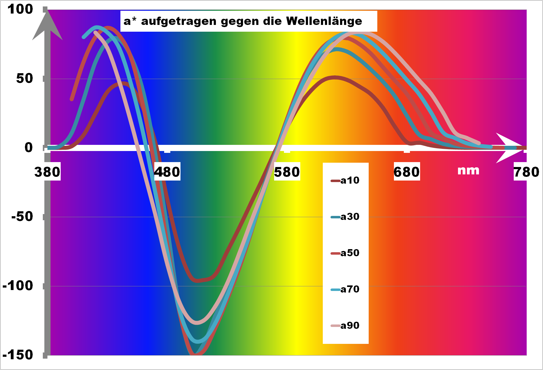 Plot der a*-b*-Farbartebene im L*a*b*-Farbraum (ermittelt aus idealisierten Rechteckspektren der Breite 10 nm ... 100 nm)